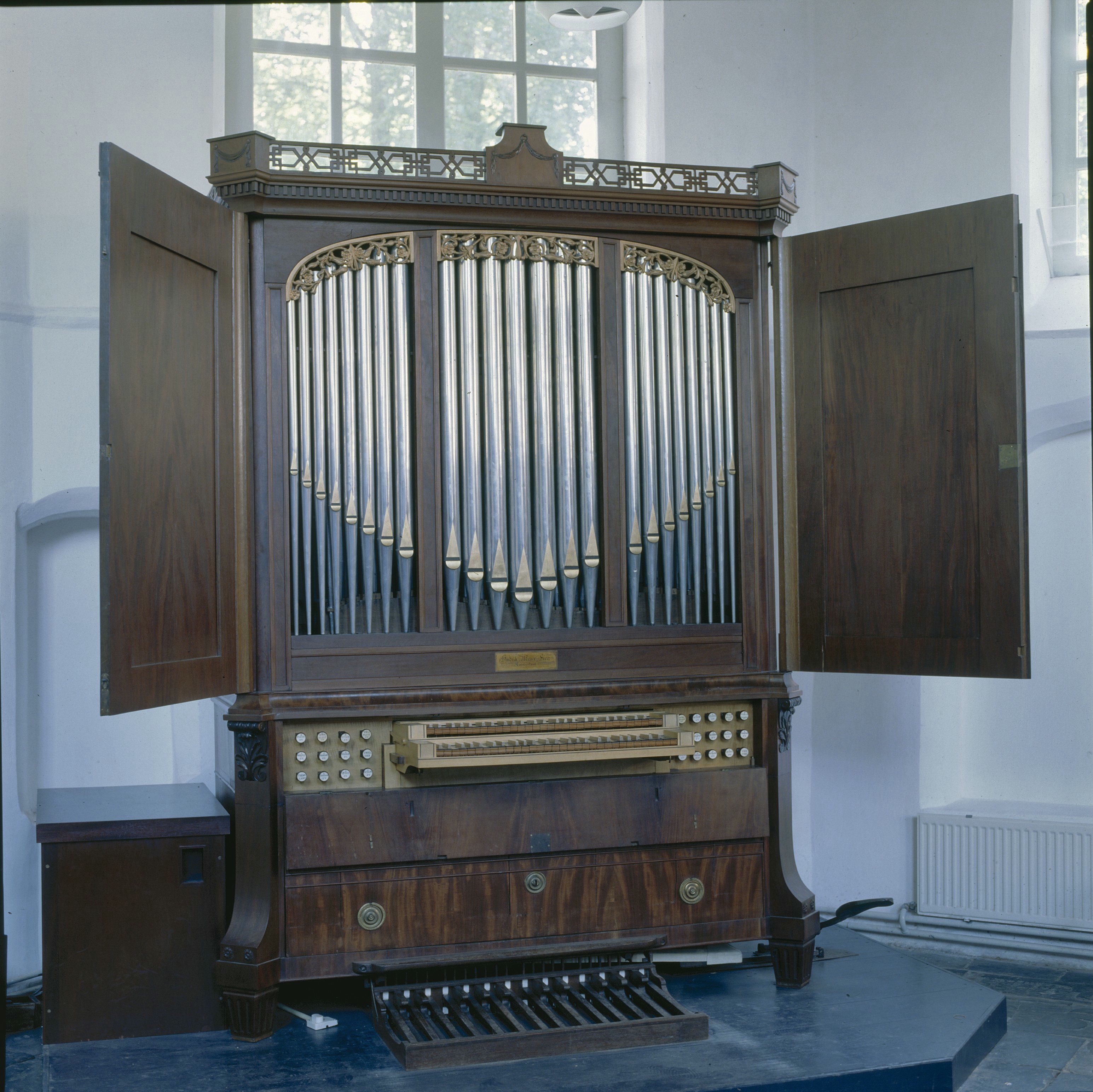 Nederlands Hervormde Kerk: Interieur, aanzicht kabinetorgel, orgelnummer 1124 (opmerking: Gefotografeerd voor Het Historische Orgel in Nederland 1790-1818)